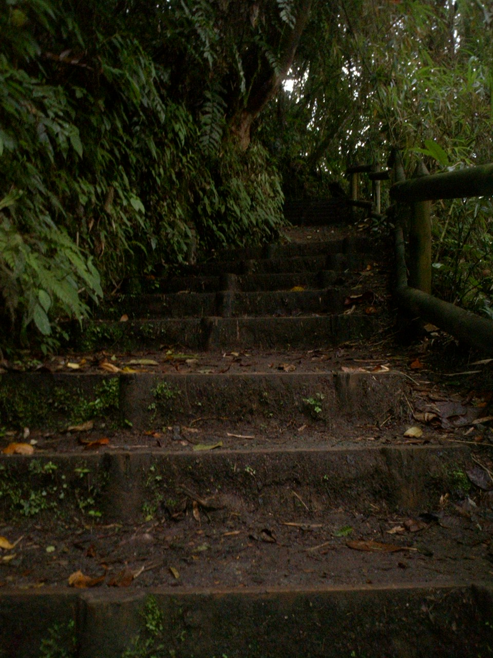 Ecoparque Los Yarumos. Sendero en medio de una selva tropical húmeda. Manizales, Caldas